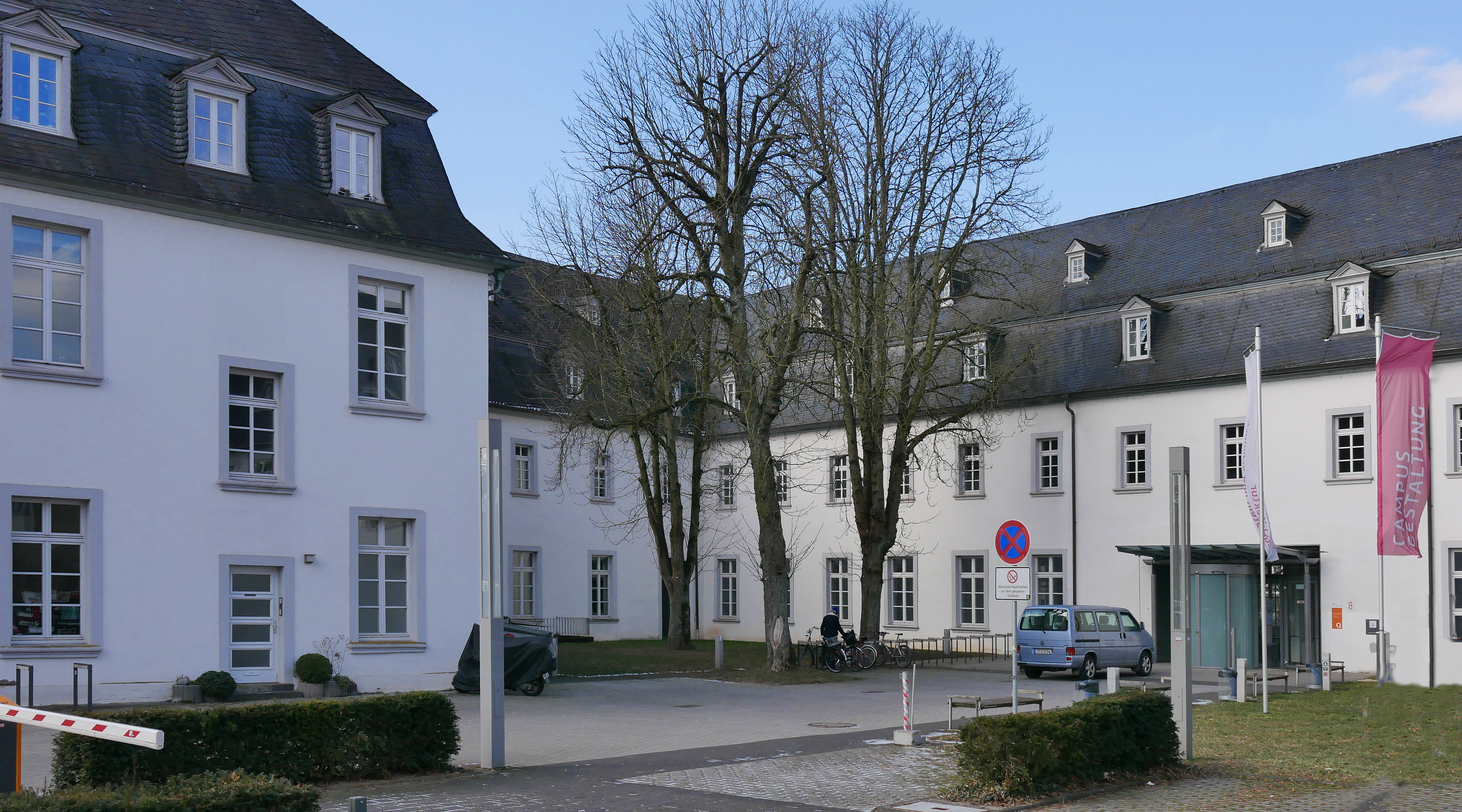 Hochschule Trier - Gestaltungscampus am Irminenfreihof